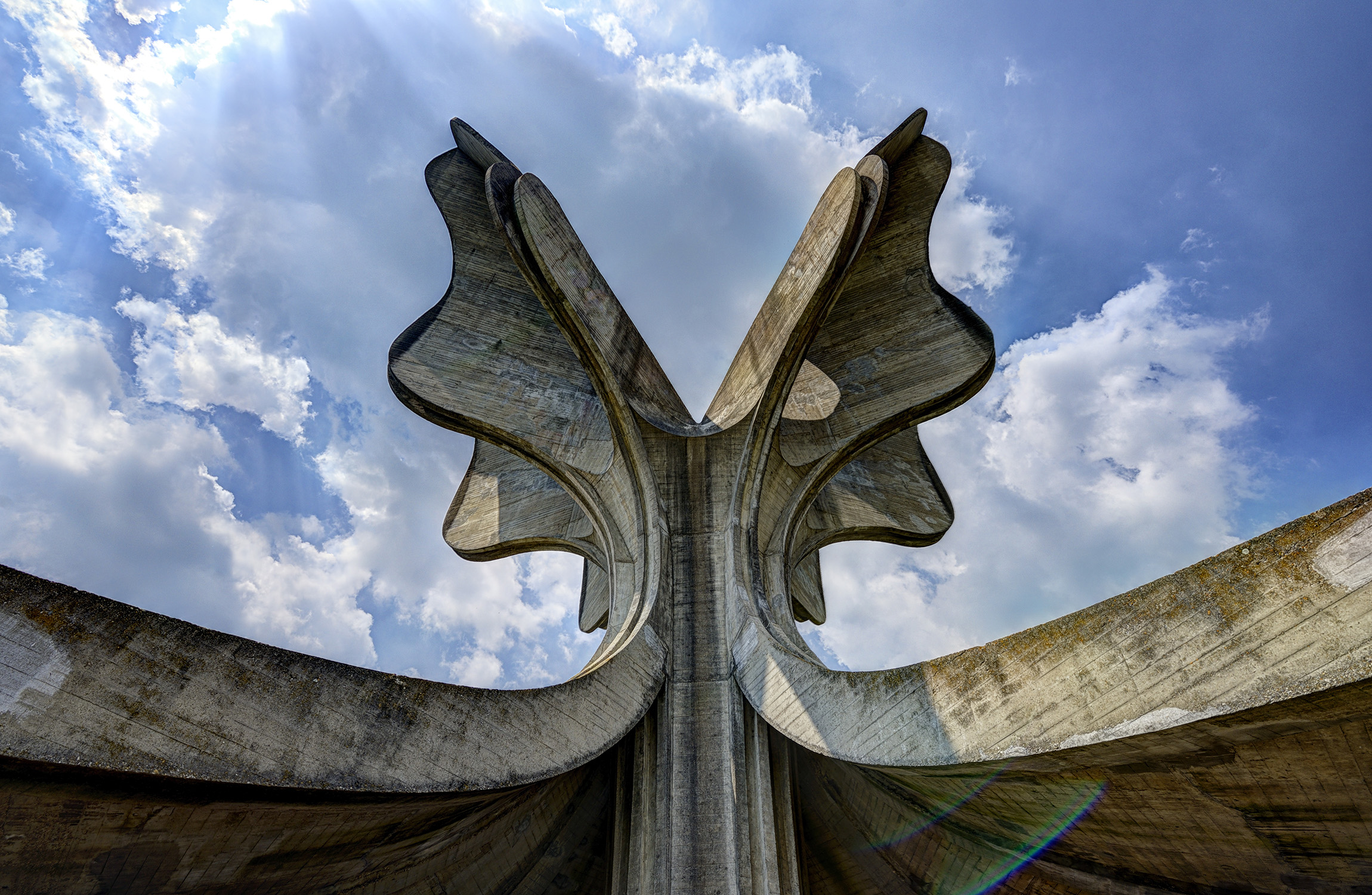 Spomen područje, Z-3411